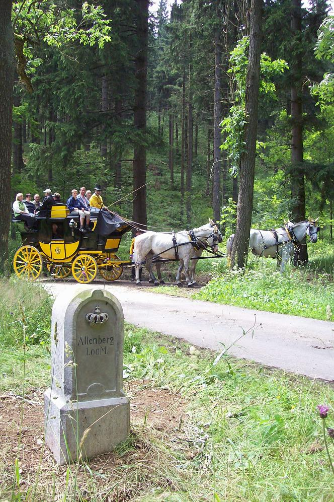 Postkutschenhalt am Meilenstein im Weißeritztal an der Zinnbrücke zwischen Seyde und Rehefeld